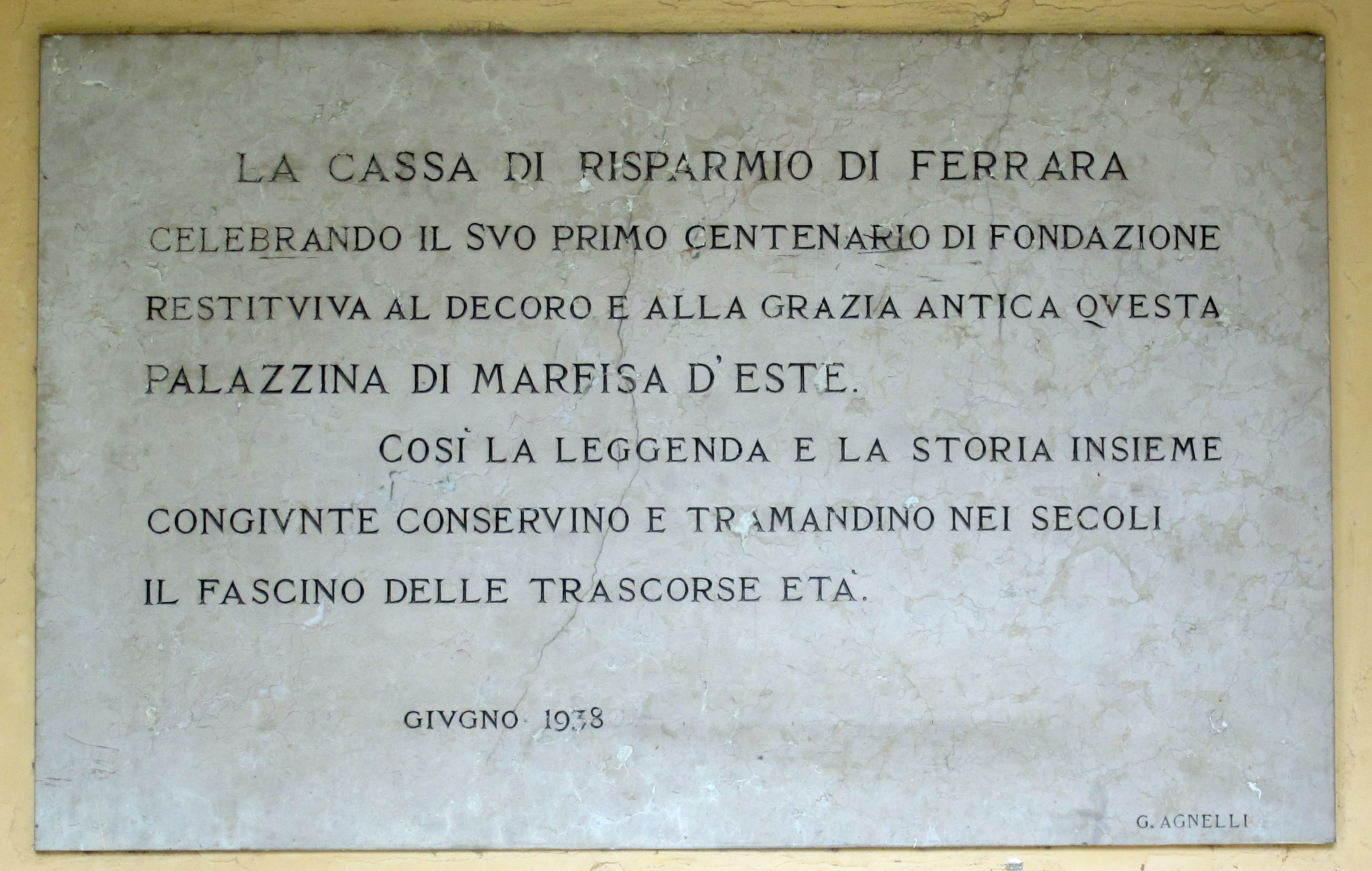 Palazzina Marfisa d'Este This is a photo of a monument which is part of cultural heritage of Italy.